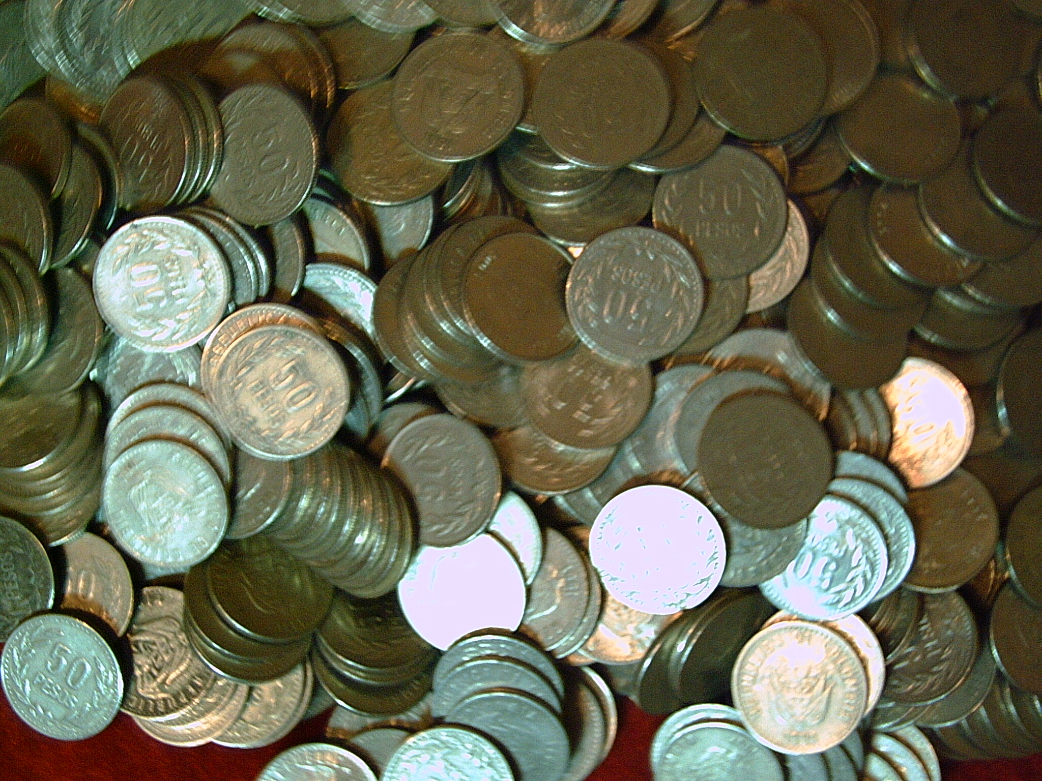 Moneda Colombiana de 50 Pesos.